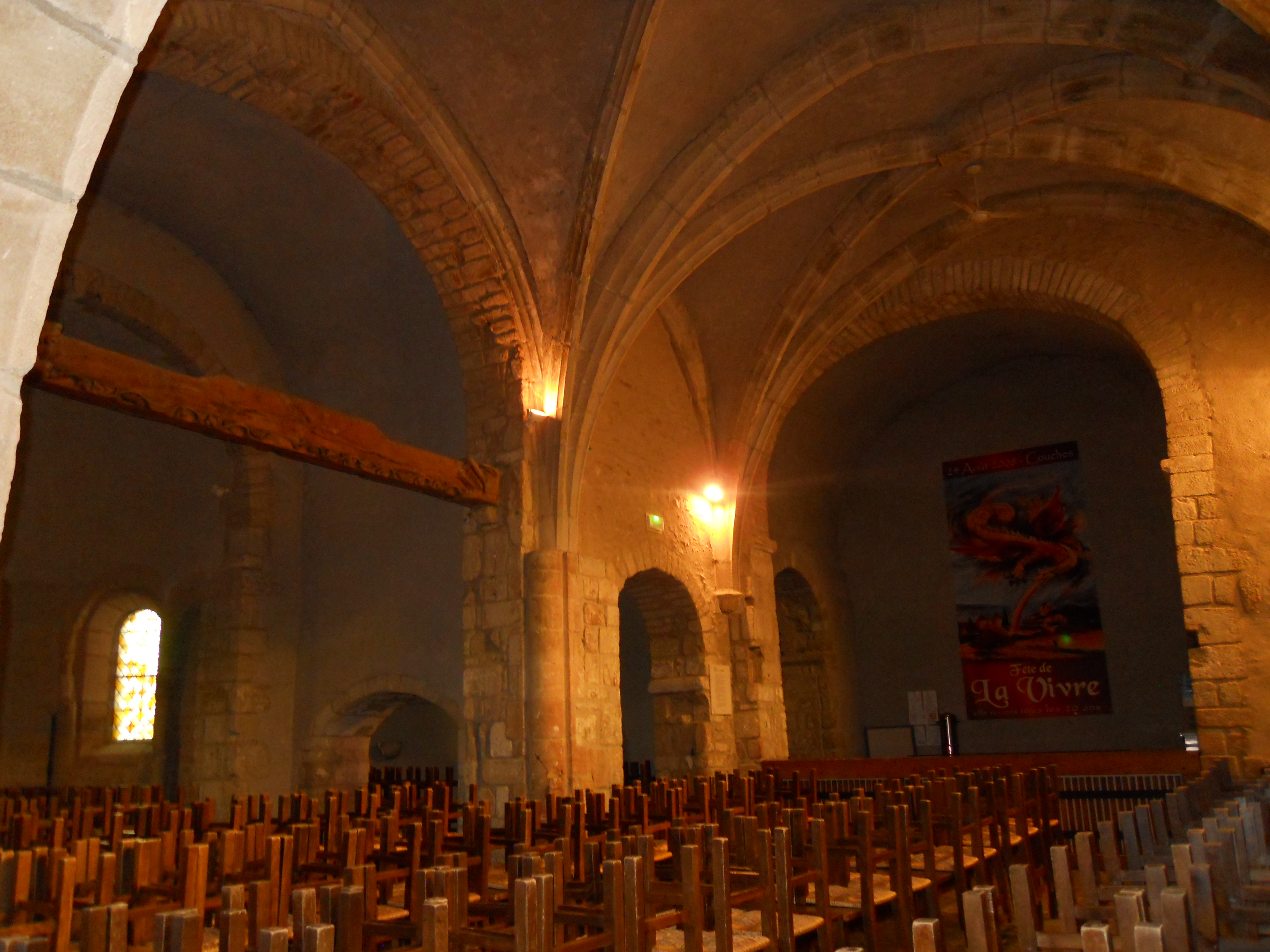 Prieuré de couches 71490